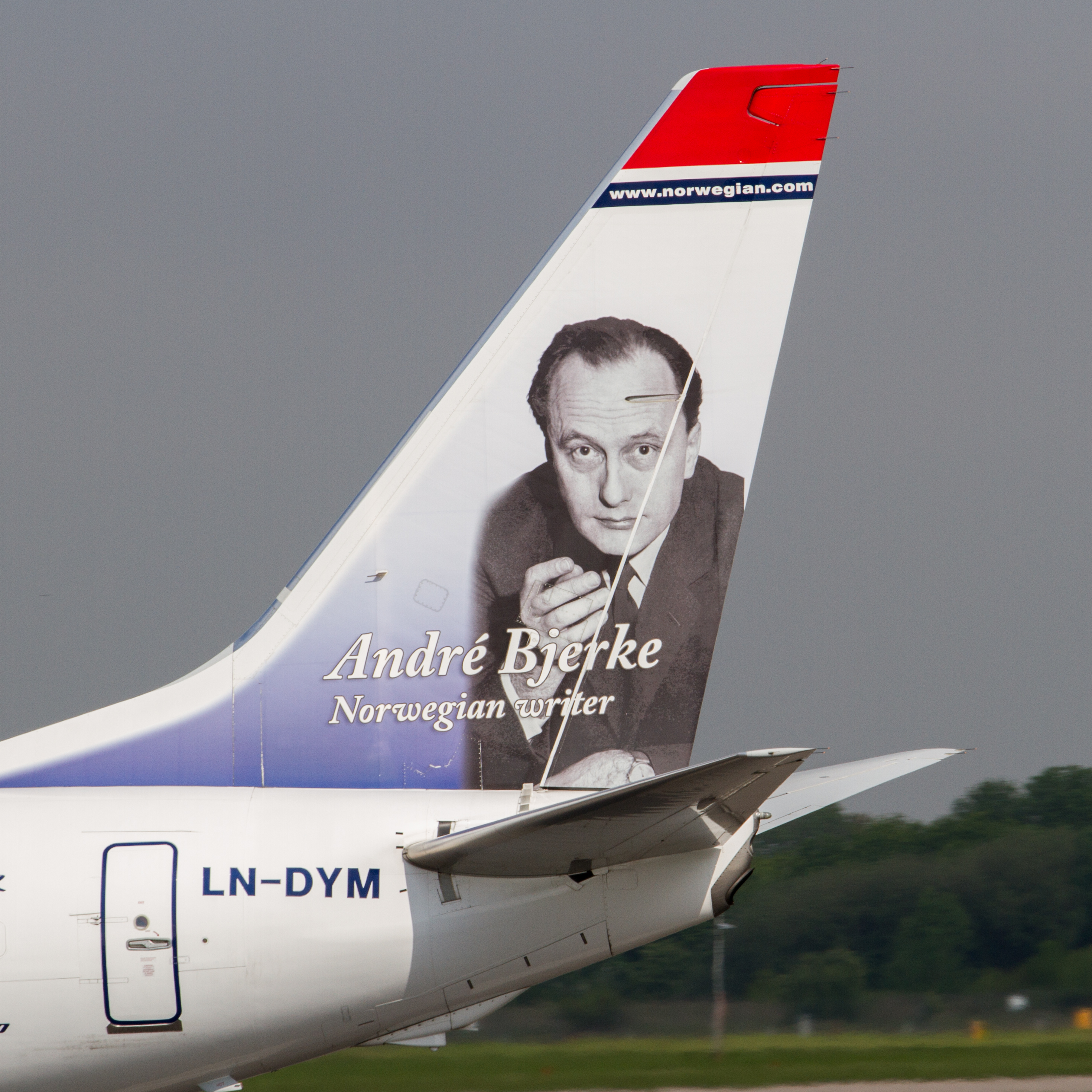 Manchester 31.05.13.